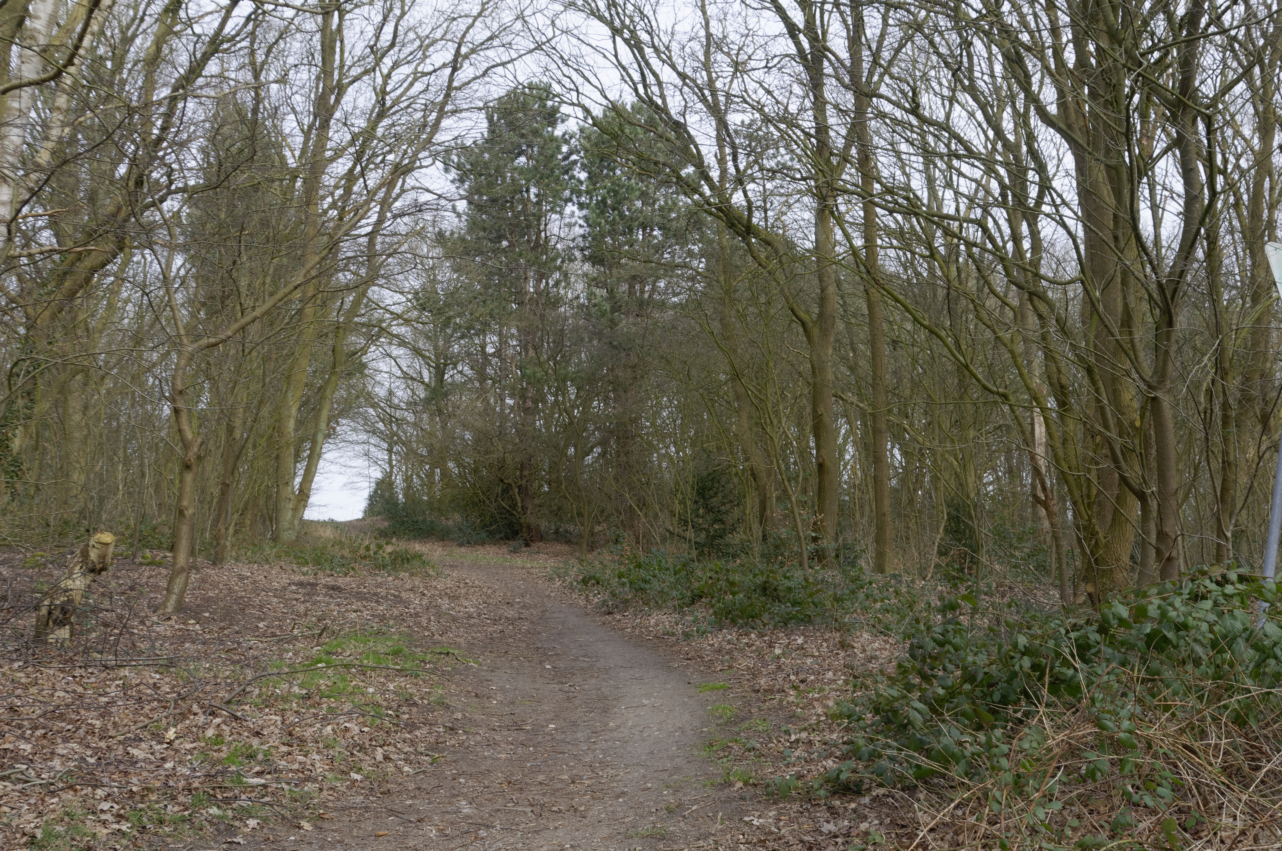 Cuxhaven Altenwalde -mix- 2020